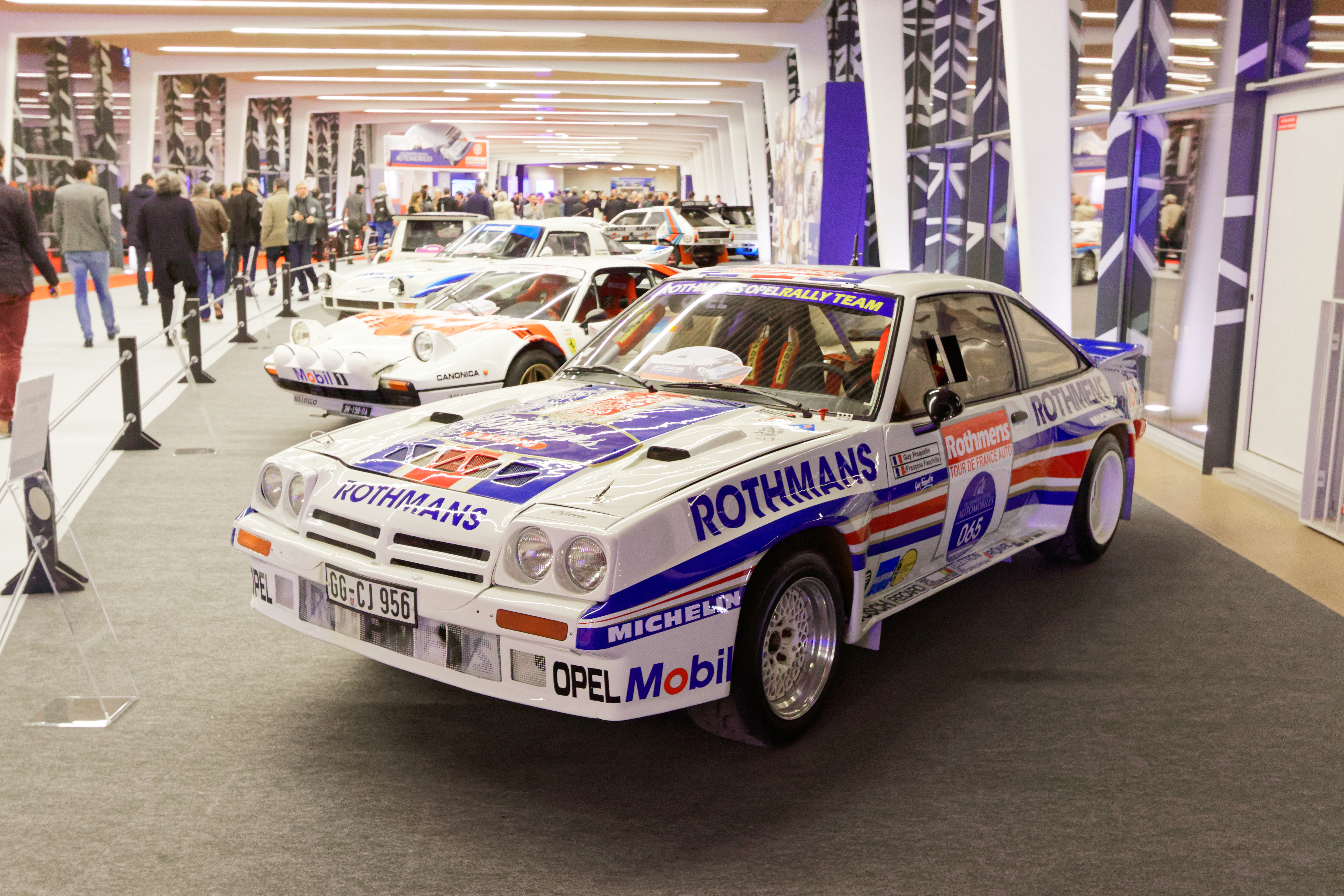 Une Opel Manta 400 de 1983 exposée lors du salon Rétromobile 2017.